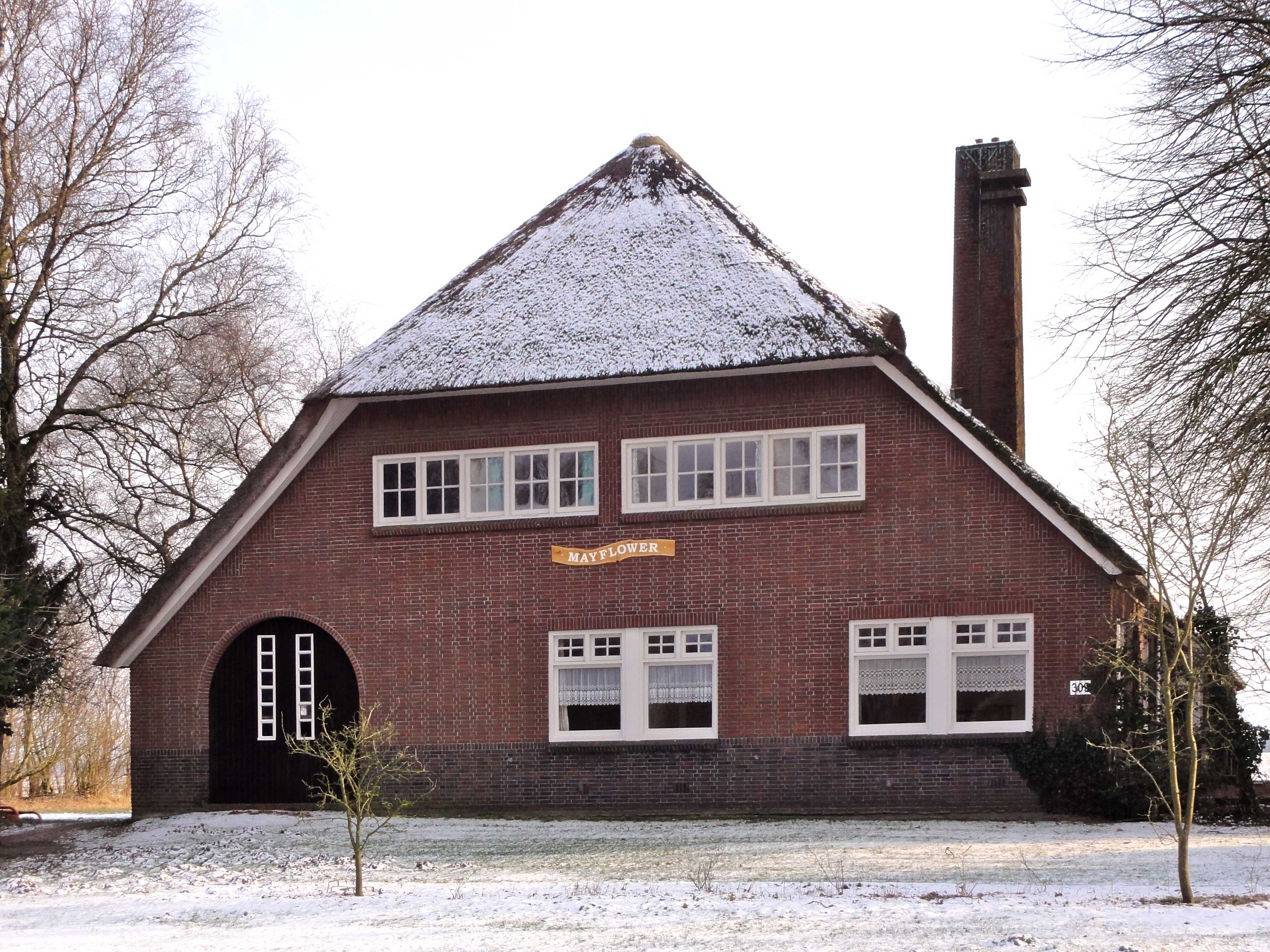 Krimpenboerderij aan het Zuiderdiep 309 in Valthe, provinciaal monument